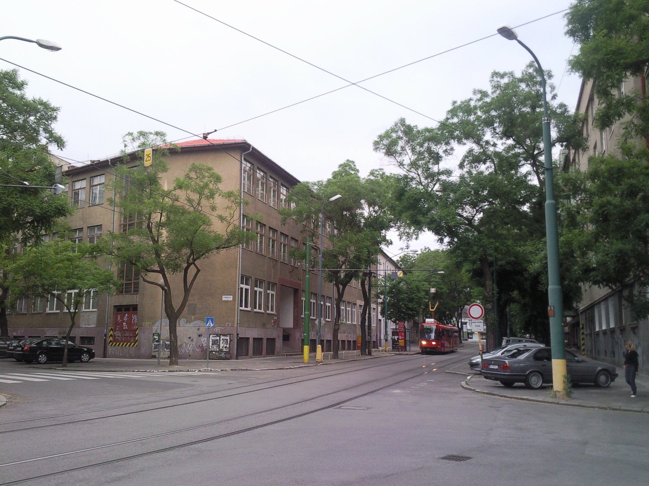 Vazovova, Bratislava